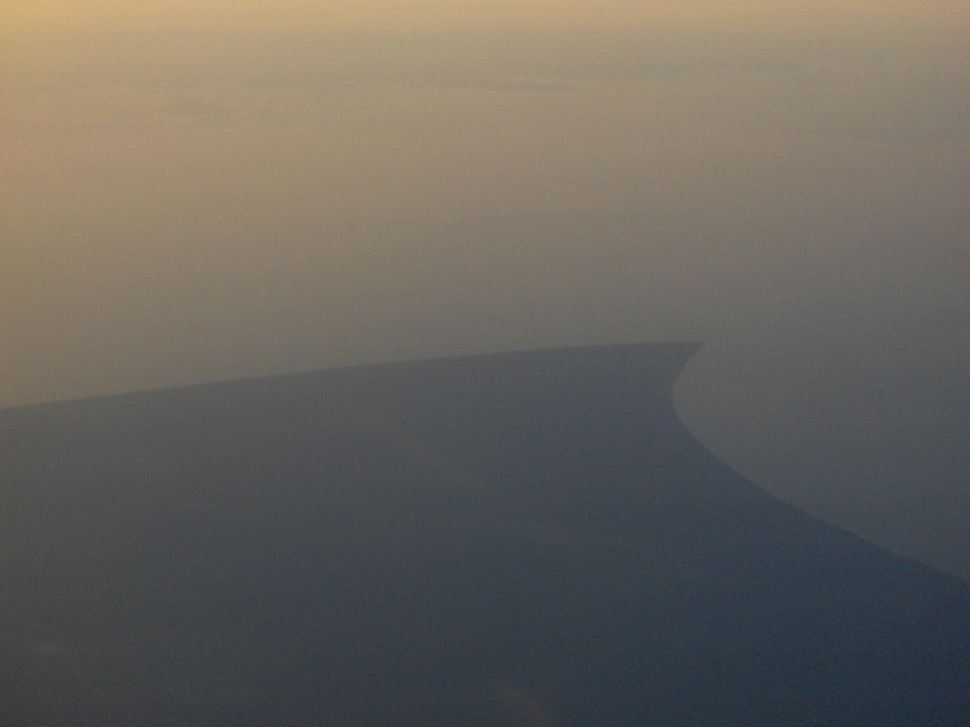 Kolka no gaisa